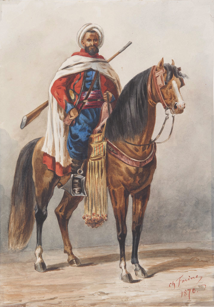 Ordonnance du colonel Bonie 3ème spahi (Cavalier arabe), par Charles FARINE (1818-1883), 1870. Aquarelle, avec léger dessin à la plume sur papier blanc. Hauteur de la feuille en mm 358 ; Largeur de la feuille en mm 254. Numéro d'inventaire : Bx M 1524. Historique : Ancienne collection BONIE. Mode d'acquisition Legs Bonie, 1895. (Musée des Beaux-Arts - Mairie de Bordeaux. Cliché DAVID, Florian).